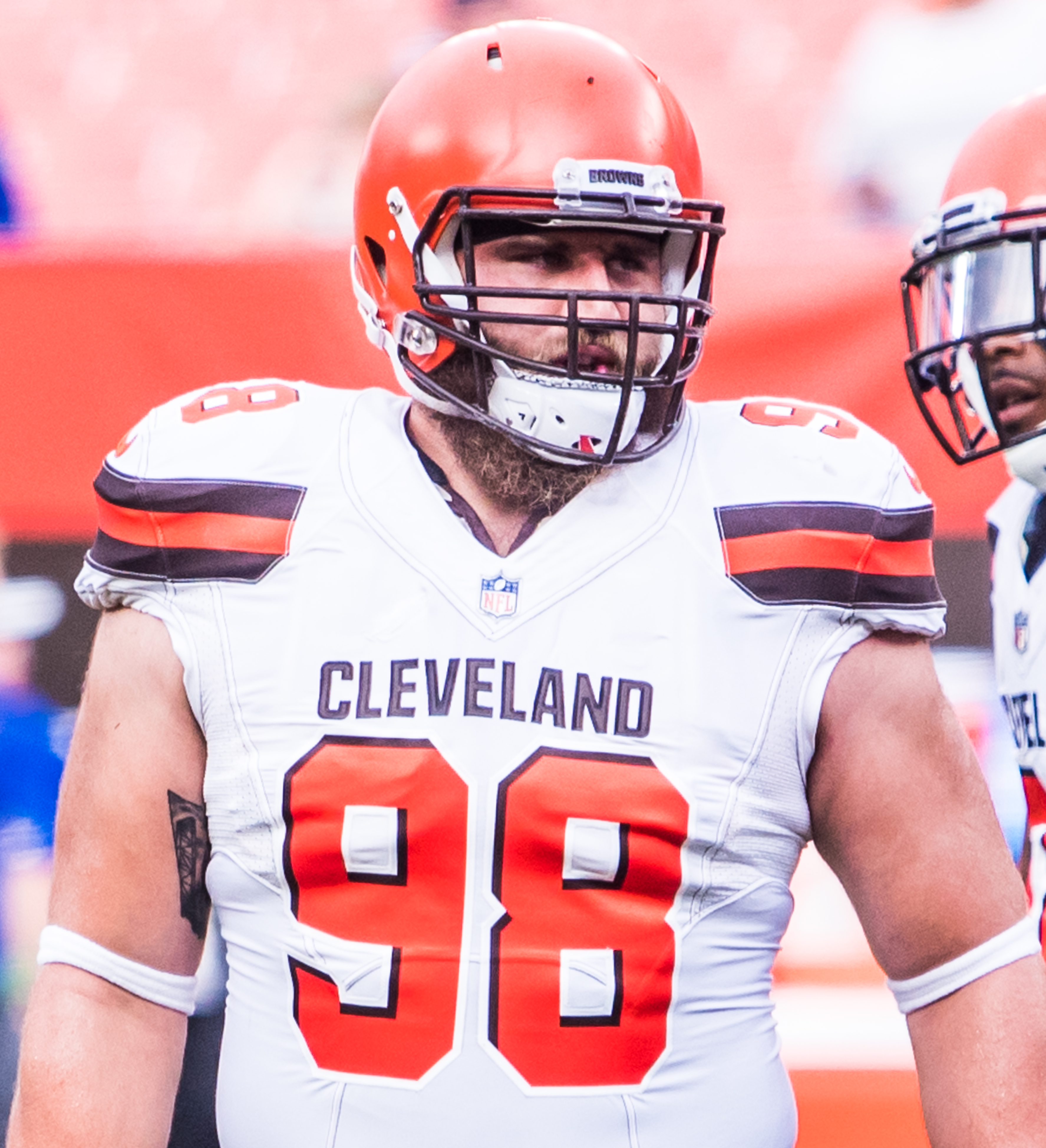 Jamie Meder